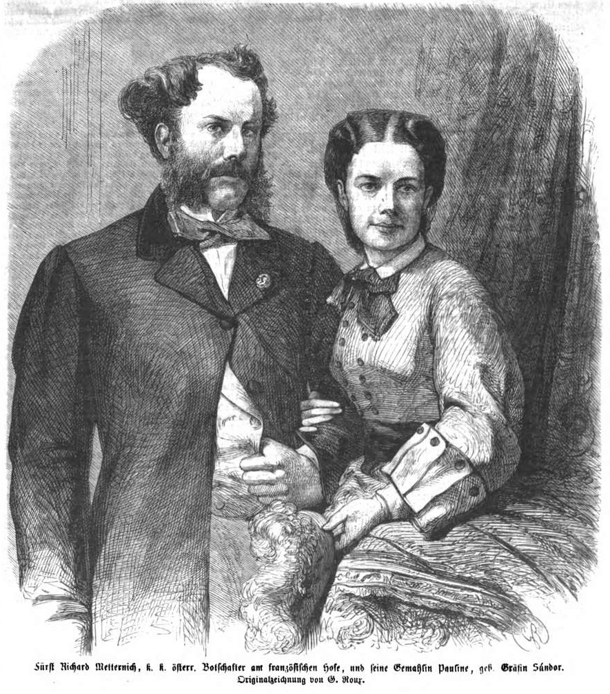 Richard Klemens v. Metternich mit seiner Frau Pauline, geb. Gräfin Sándor, 1862.